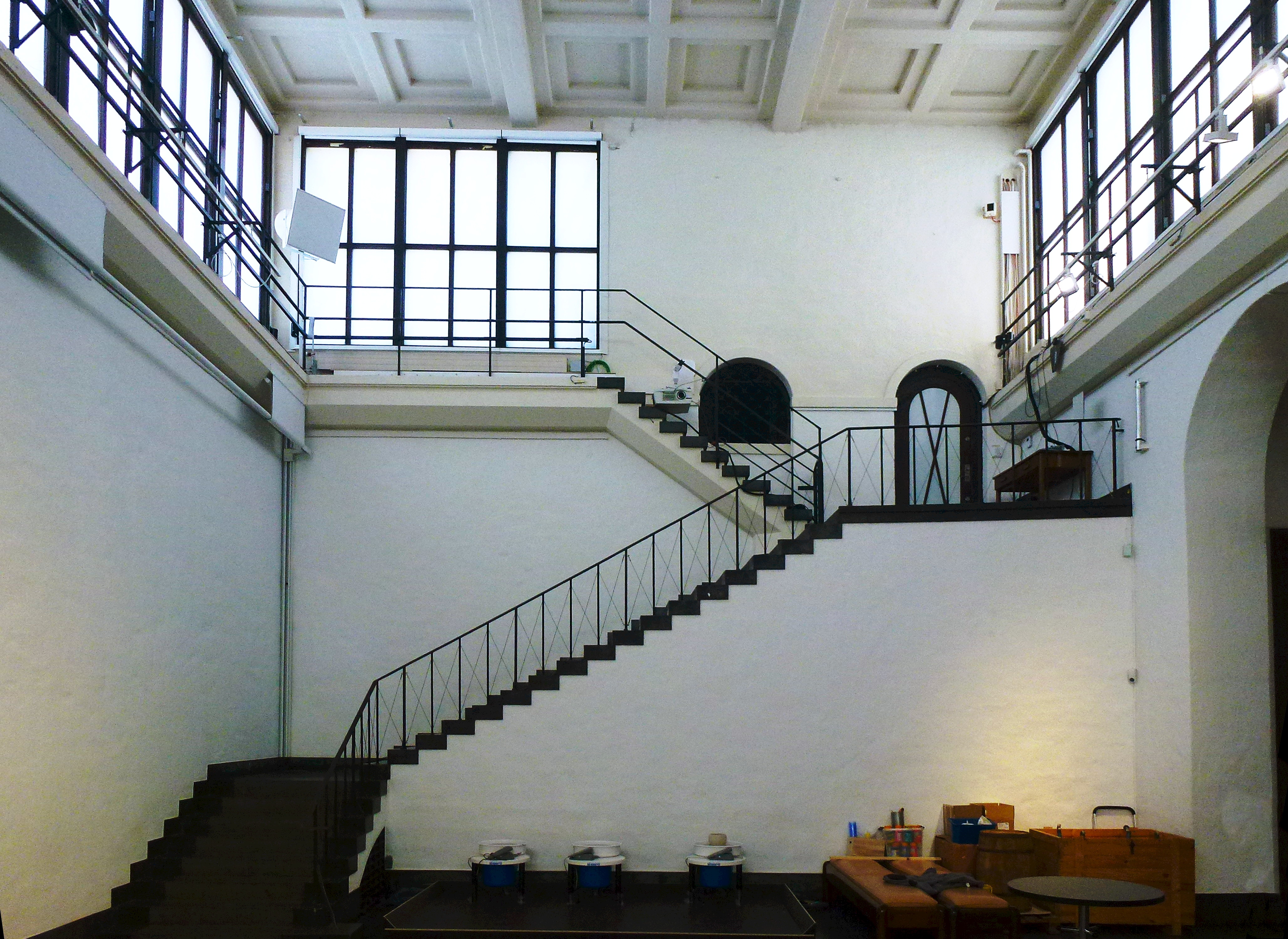 Liljevalchs trappa